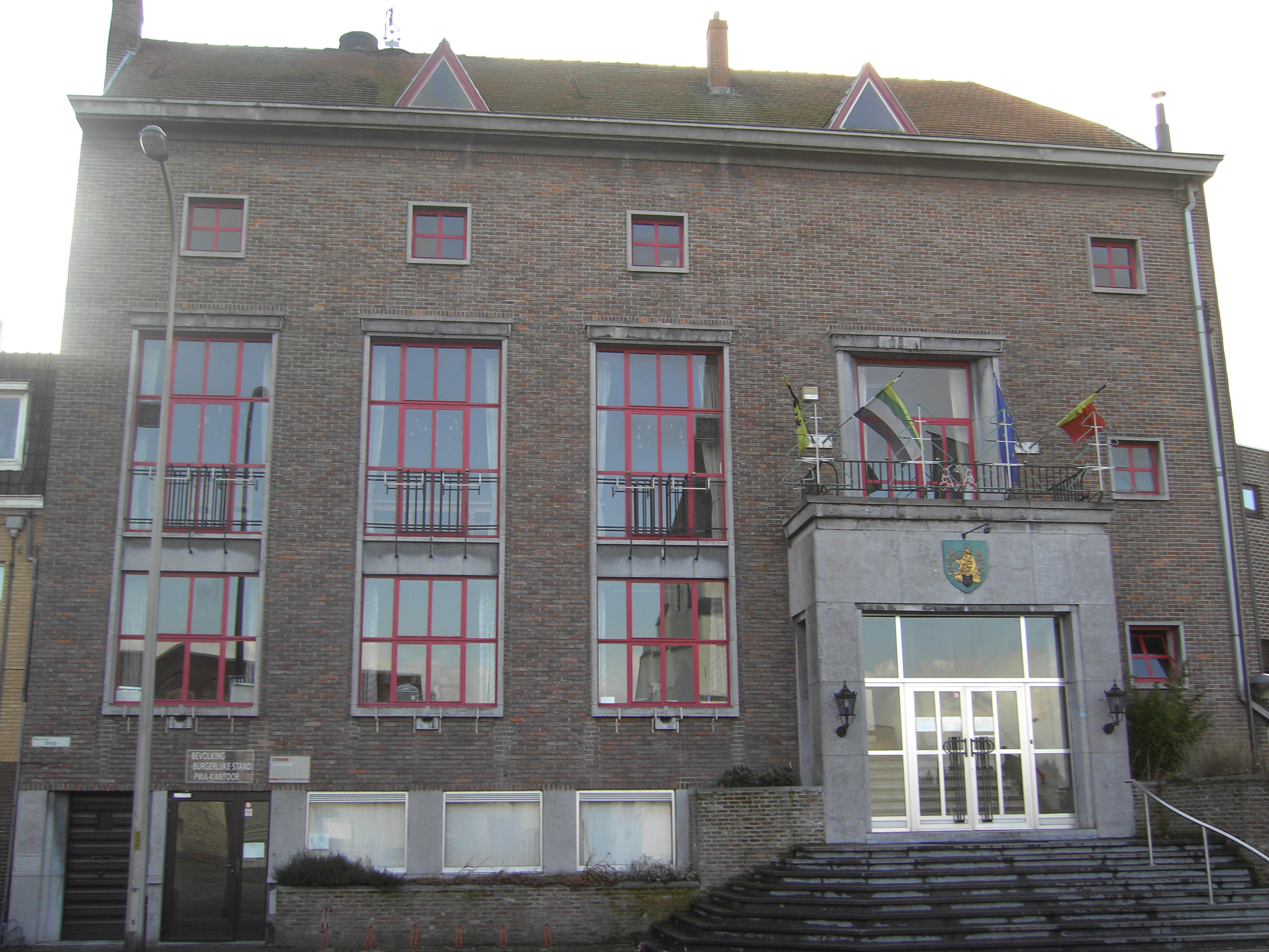 Waarschoot - Belgium - Town hall